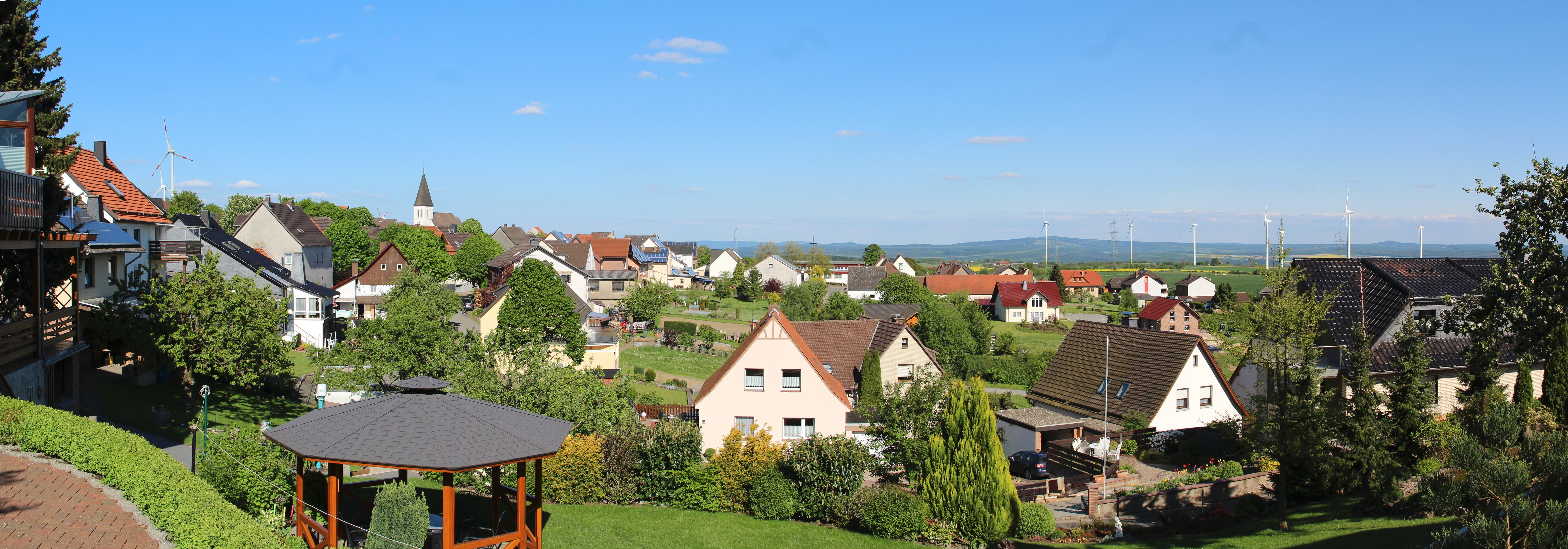 Dorfmitte mit Kirche. Die Kirche befindet sich etwa in OWO-Richtung von der Aufnahmeposition. Am Horizont der Reinhardswald mit den Bergkuppen des Langenberg (430 m), Hahneberg (460,8 m) und Staufenberg (472,2 m) (von links nach rechts).